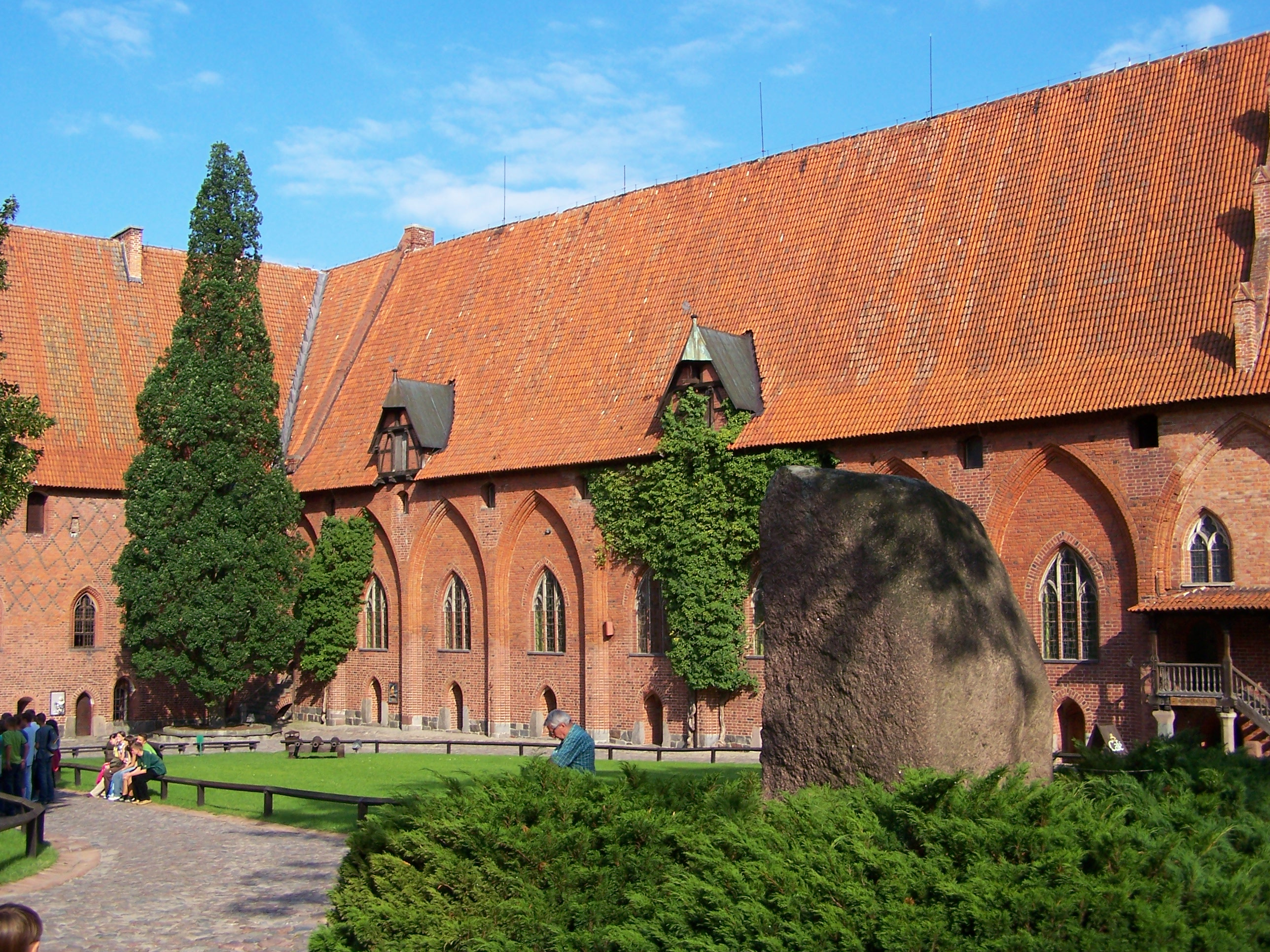 Dziedziniec zamku średniego w Malborku.